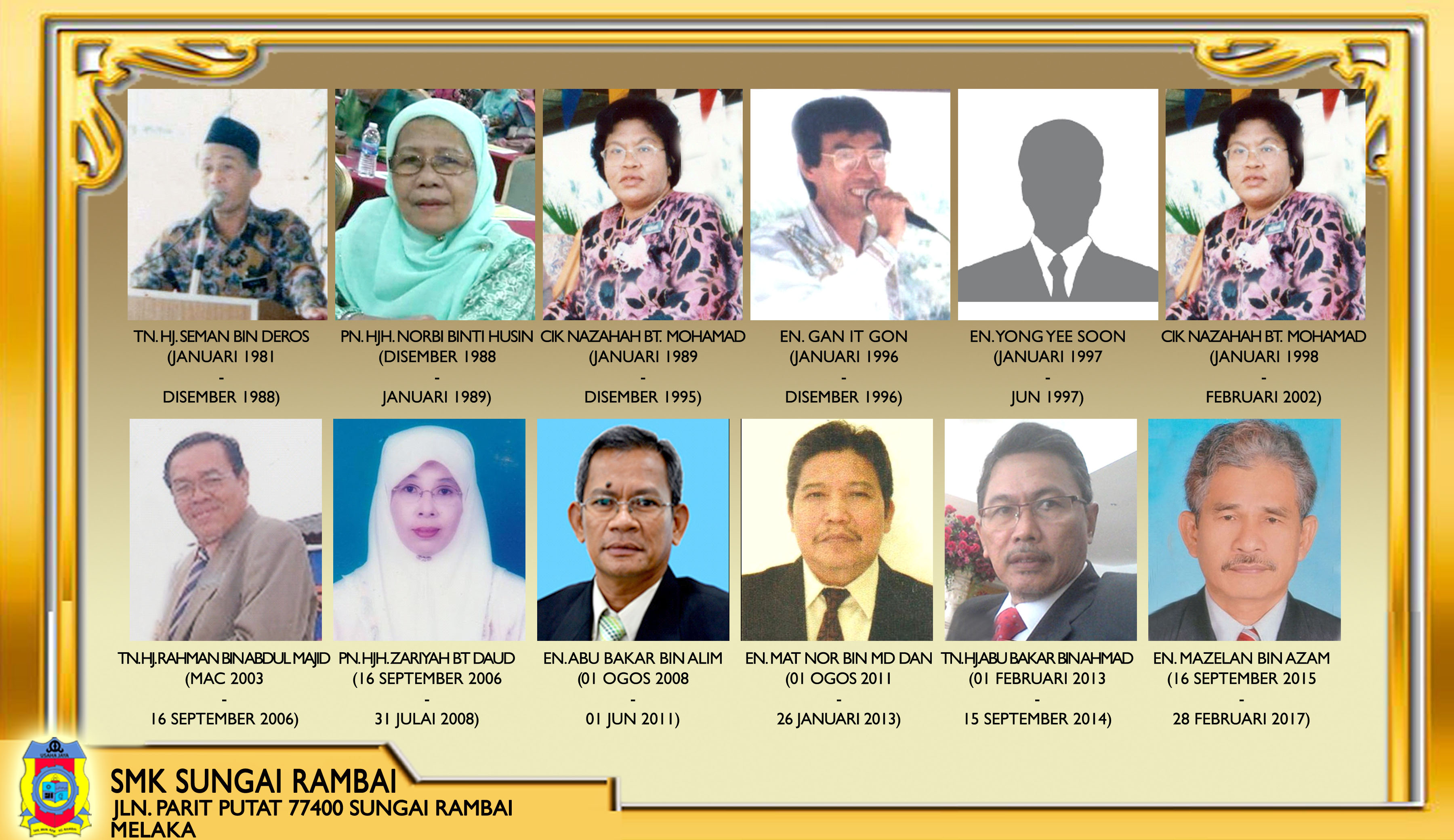 pengetua lama sk sungai rambai